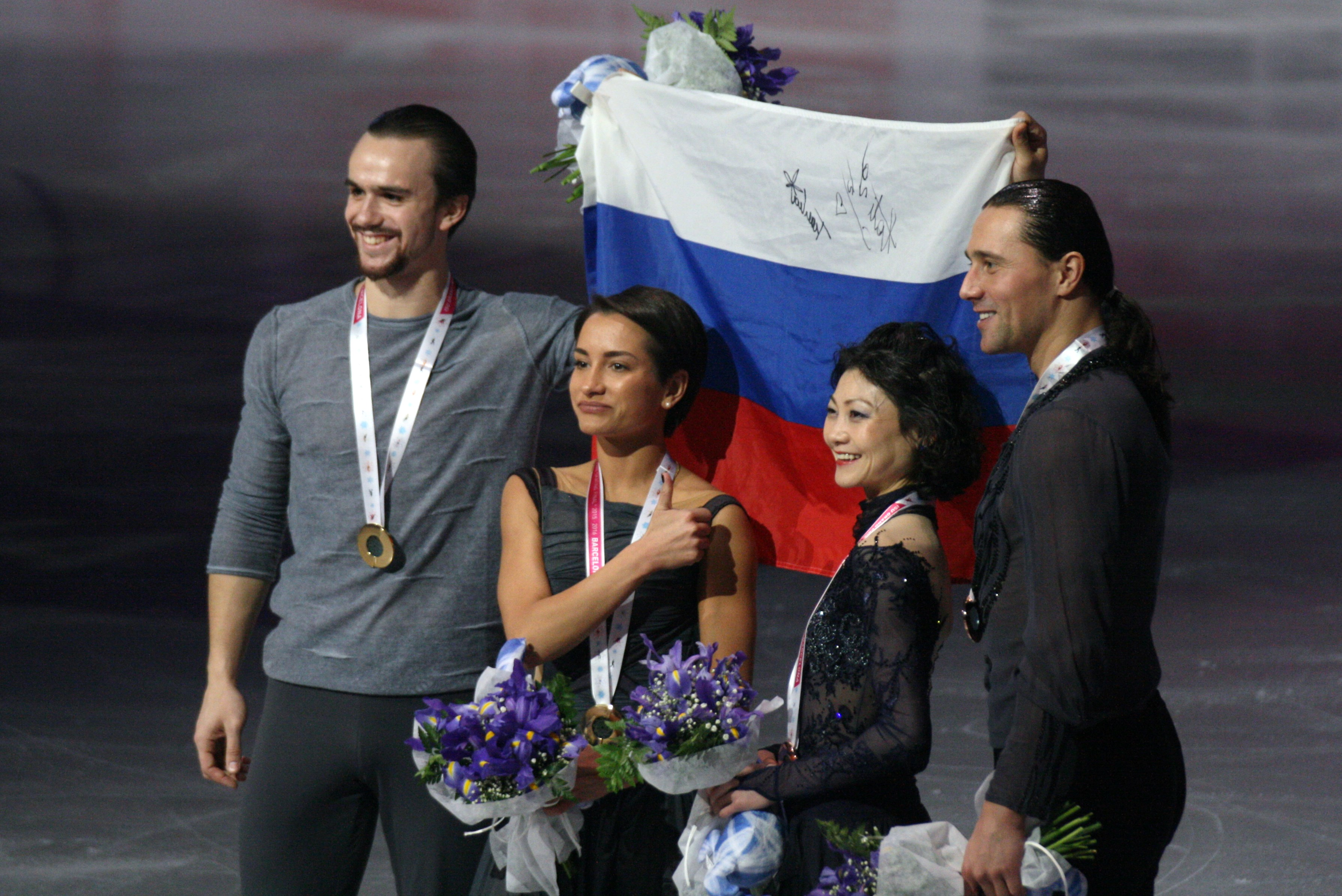 Ксения Столбова, Федор Климов и Юко Кавагути и Александр Смирнов (Россия) на церемонии награждения в финале Гран-при по фигурному катанию 2015-2016.